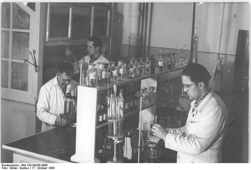 Illus-Köhler-17.10.50 St-Leu. Wärmflaschen aus Buna. Der Veb Gummiwerke Weissensee stellt eine Buna-Wärmflasche ohne den bisher notwendigen Zusatz von Naturkautschuk her.Sie wurde von dem Chemiker des Werkes,Kurt Lehmann,entwickelt,der dafür am 13.Oktober als Aktivist ausgezeichnet worden ist.UBz: Der Erfinder K.Lehmann (rechts) mit seinen Kollegen im Labor.